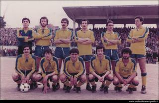 Foto Audace Cerignola